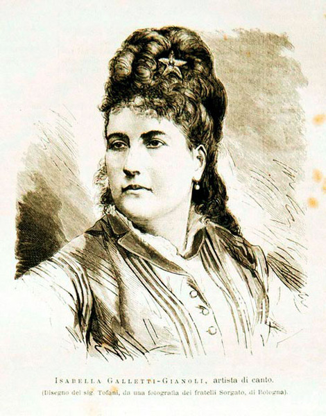 Isabella Galletti Gianoli (1835-1901)